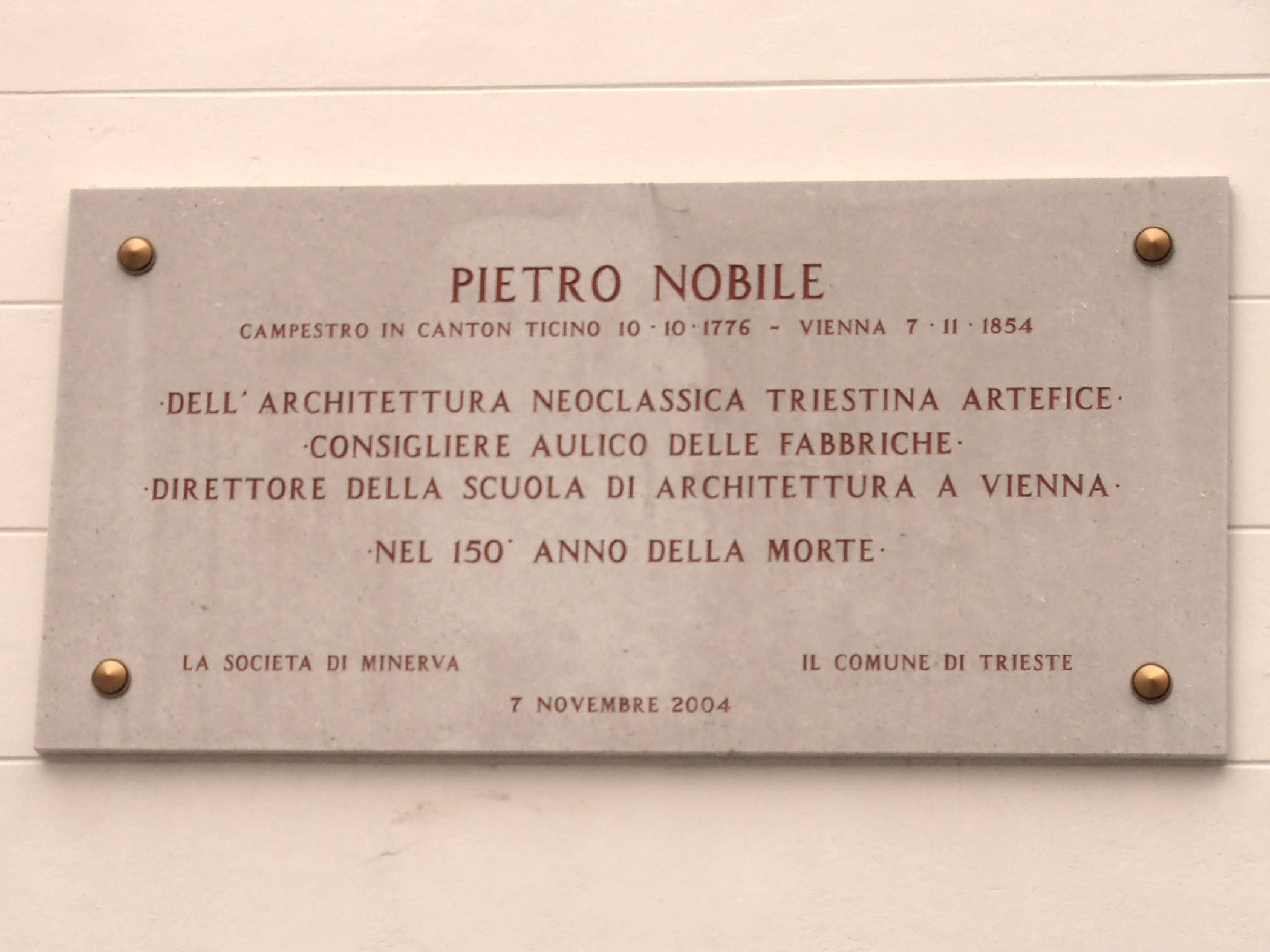 Italy - Trieste - Largo dei Granatieri - Targa a Pietro Nobile